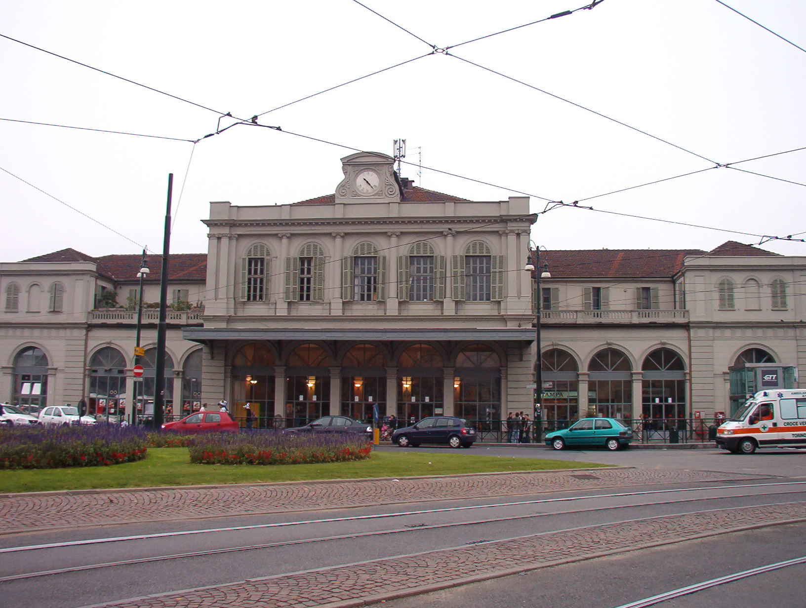 Stazione ferroviaria di Torino Porta Susa - Torino - Italy